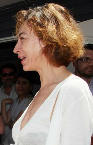 Patricia Rivadeneira